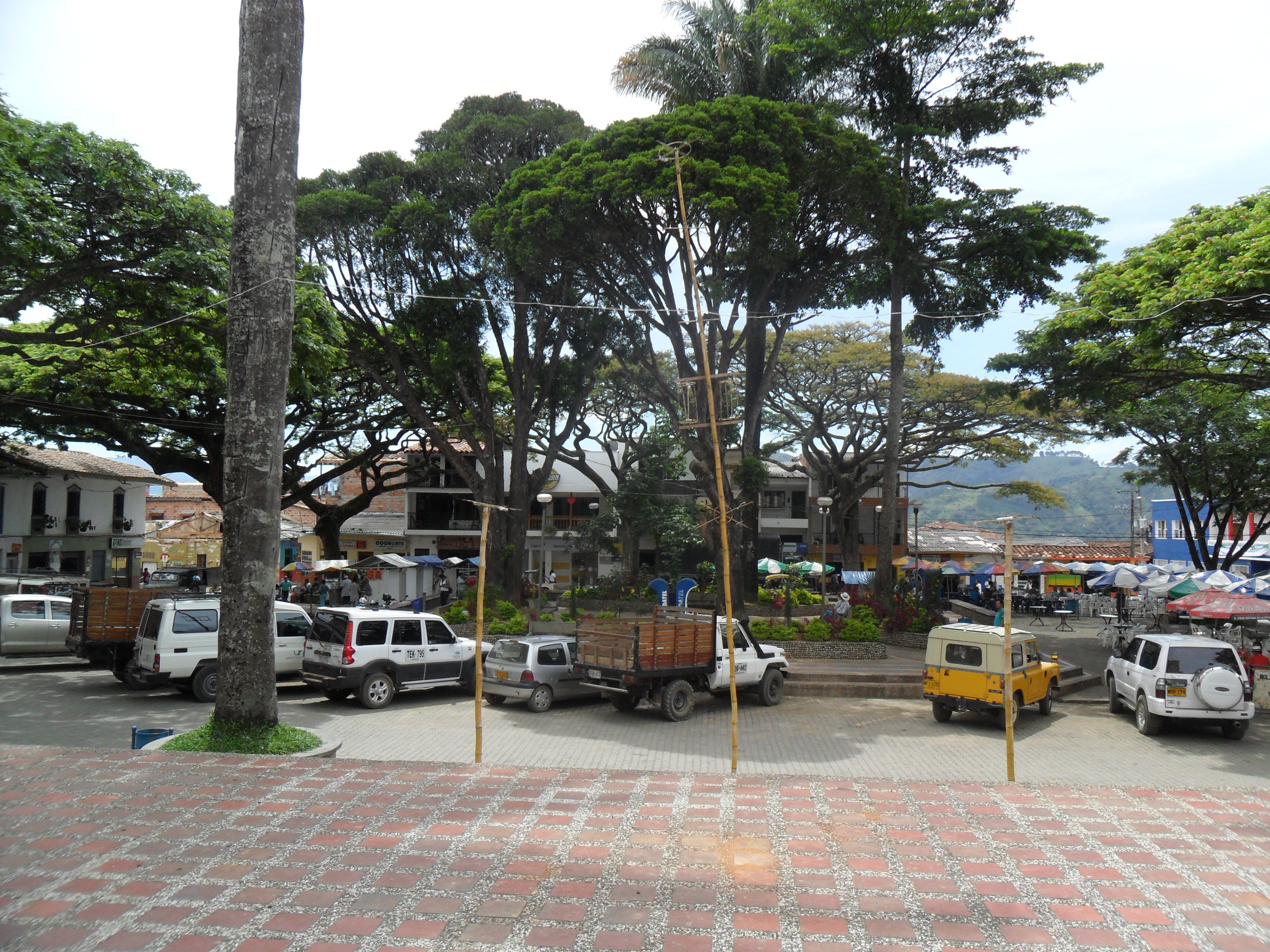 Vista del parque principal del municipio de Betania (Antioquia), visto desde el atrio de su iglesia.